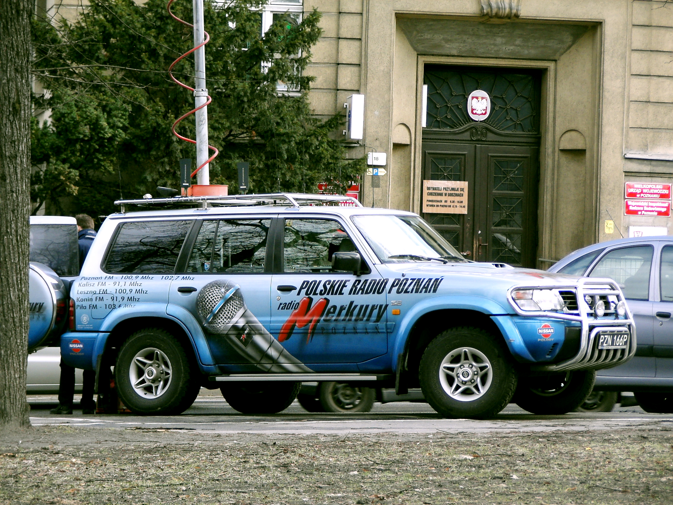 Wóz reporterski Radia Merkury. Nissan Patrol